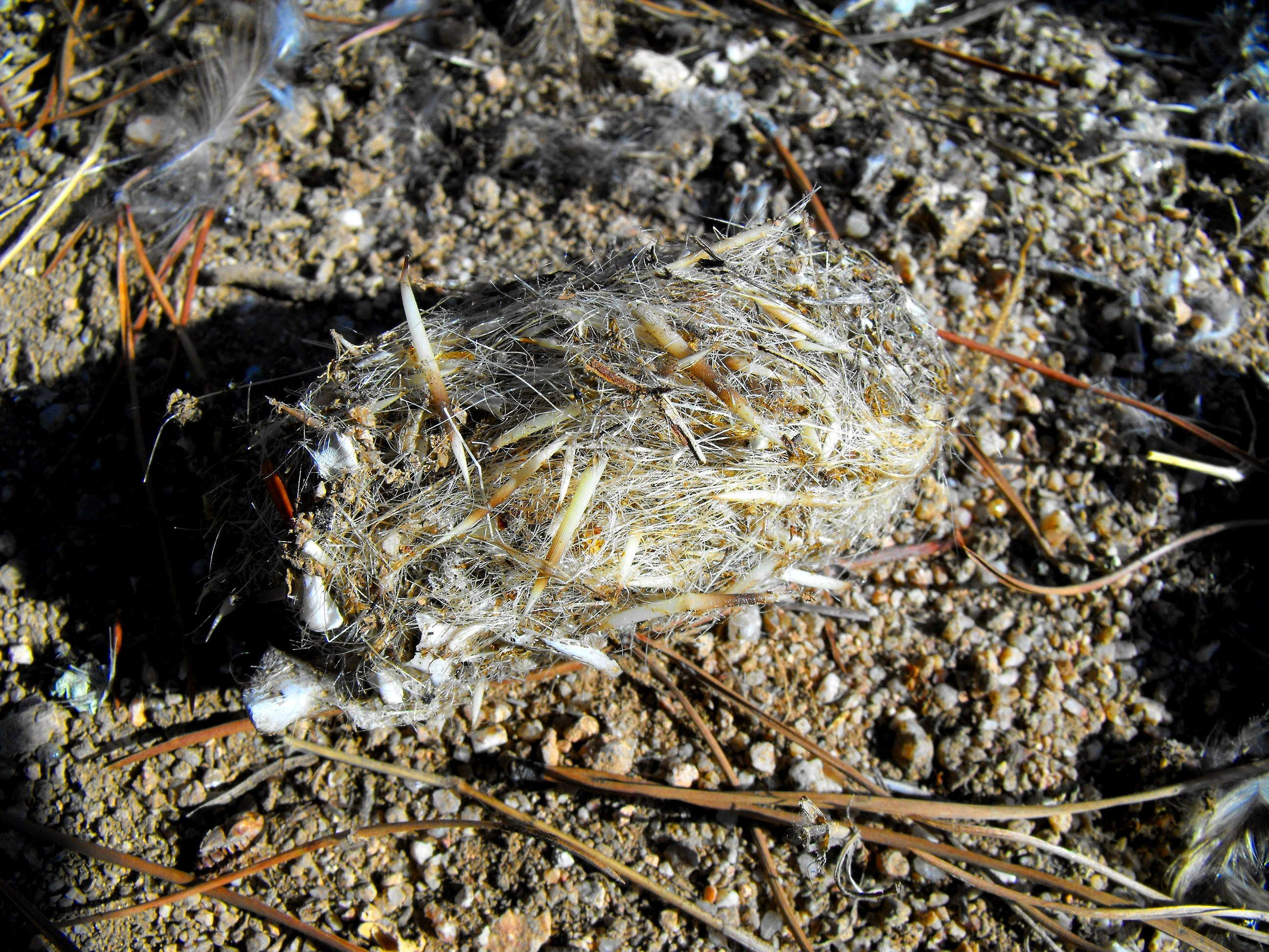 En las inmediaciones de un nido de búho real se encontraba esta egagrópila. Resulta casi inconcebible pensar como este ave puede tragar entero un erizo y salir indemne después de expulsar todas las púas. Cuenca del río Yeguas en el Parque Natural de la Sierra de Cardeña y Montoro.